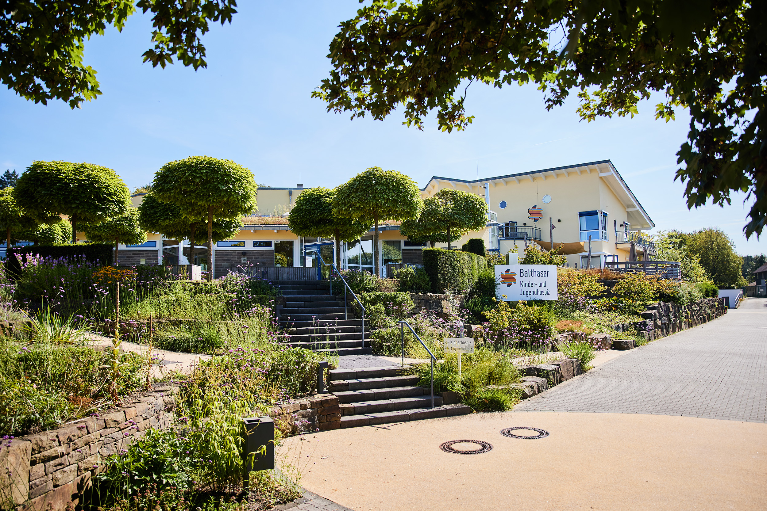 Eingangsbereich des Kinder- und Jugendhospiz Balthasar